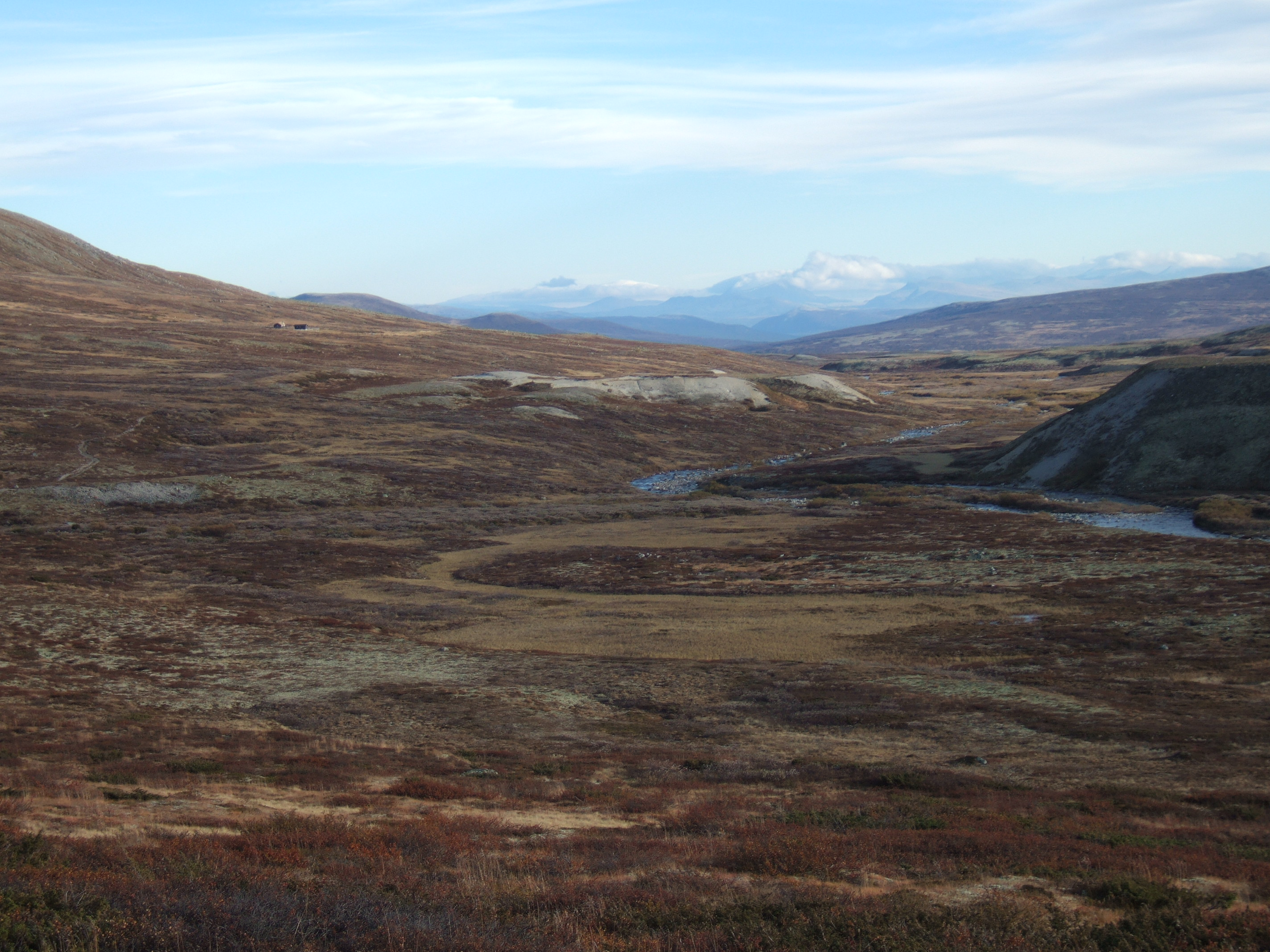 Kaldvella is a branch from the west to Svone/Driva in Oppdal.